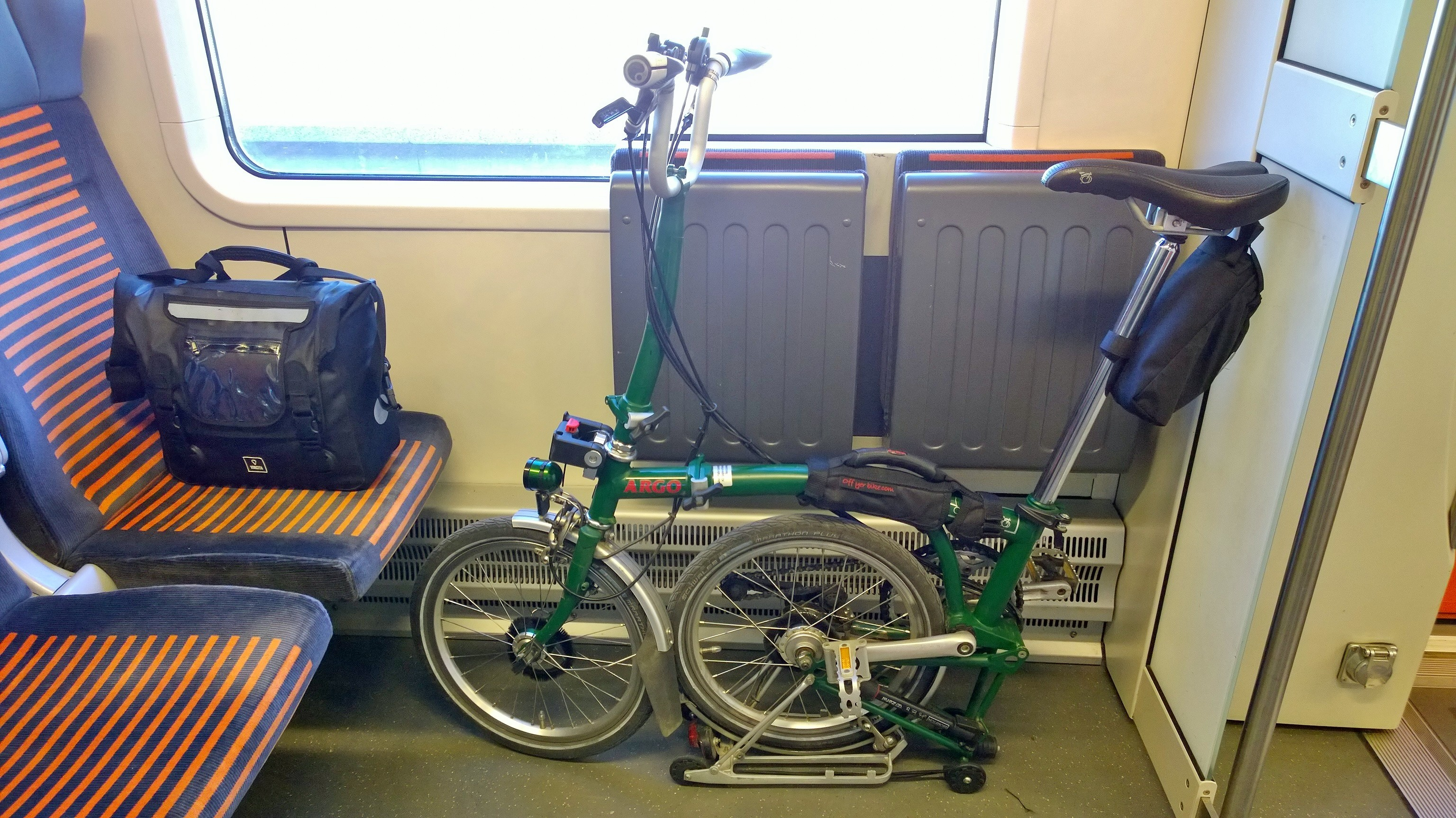 Brompton polkupyörä puolittain taitettuna junassa